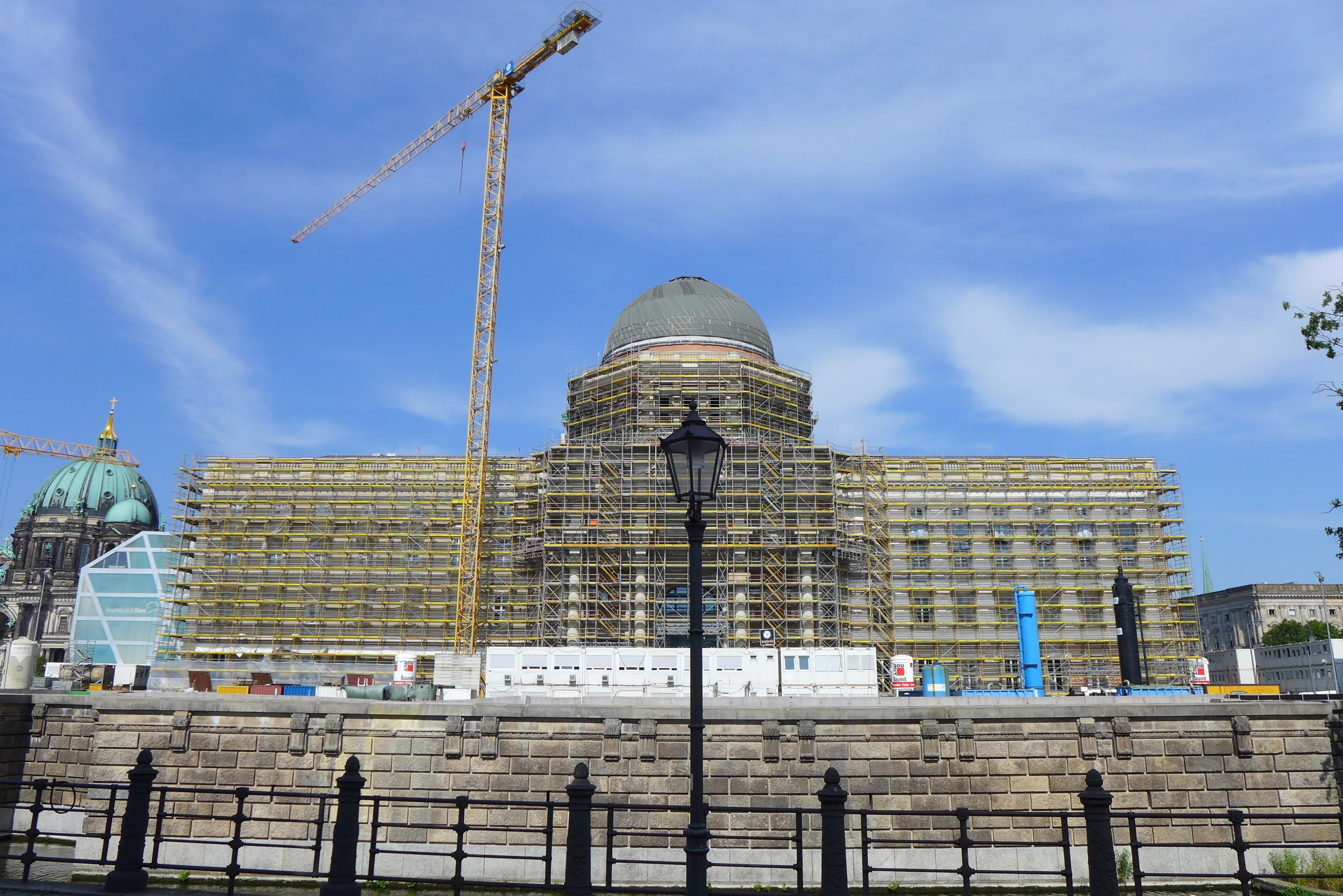 Stadtschloss Berlin, Portalfront, Zustand Anfang August 2018